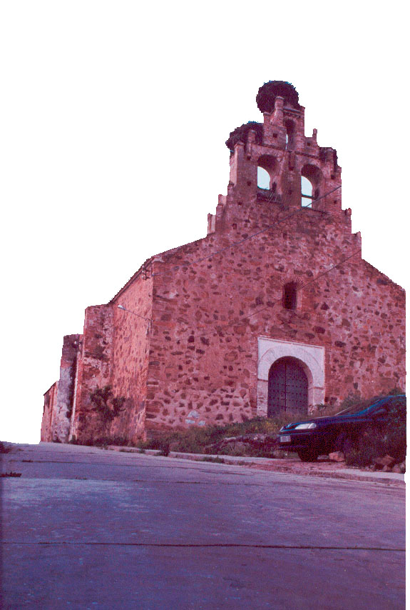 Antigua iglesia de Santa Brígida de Peñalsordo, Badajoz.